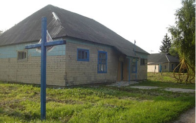 Довгий час Богданівка була без храму, доки не відкрили нову церкву у 2002 році.Приміщення для храму було виділено у колишній бані.